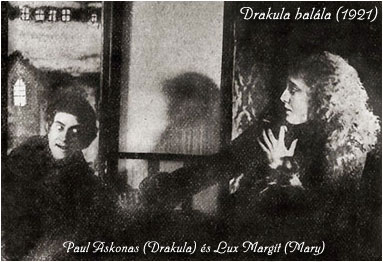 Один из немногих сохранившихся кадров утраченного фильма